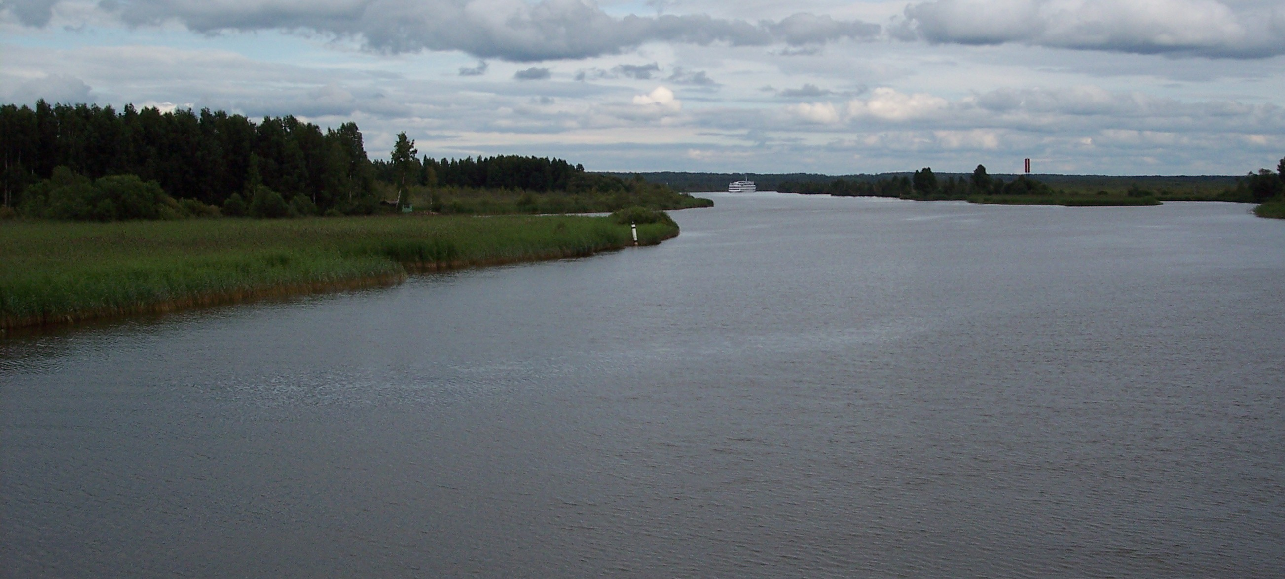 Der Blick auf den Beginn der Scheksna vom Onegasee aus. andere Versionen